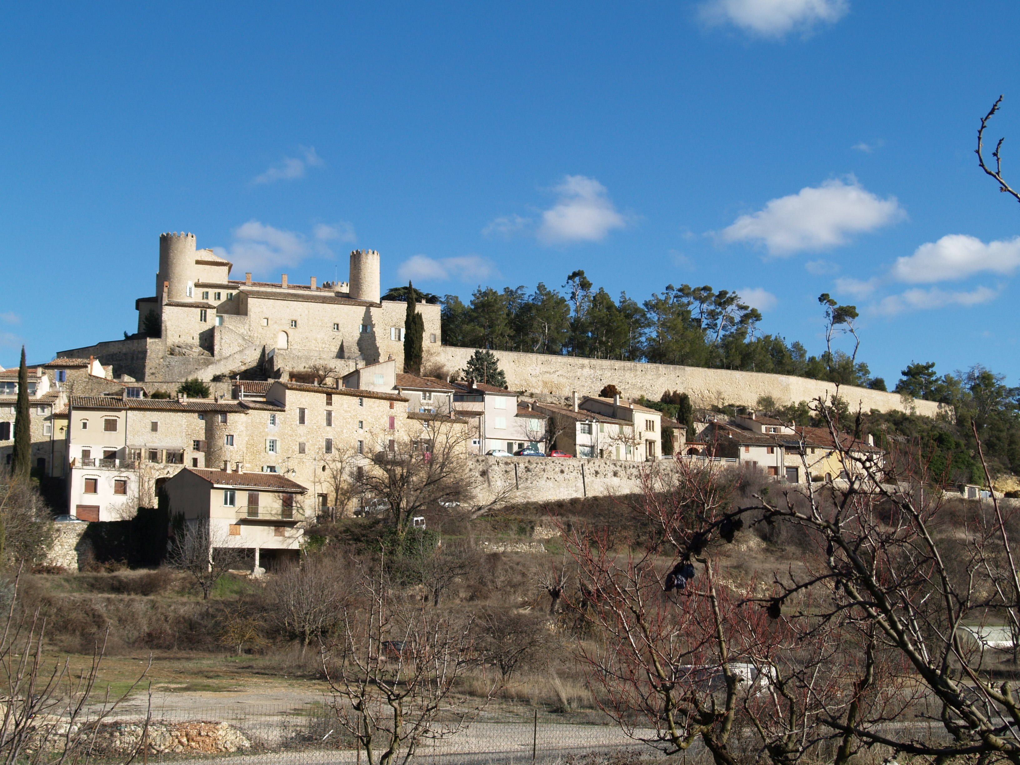 vue générale de mirabeau